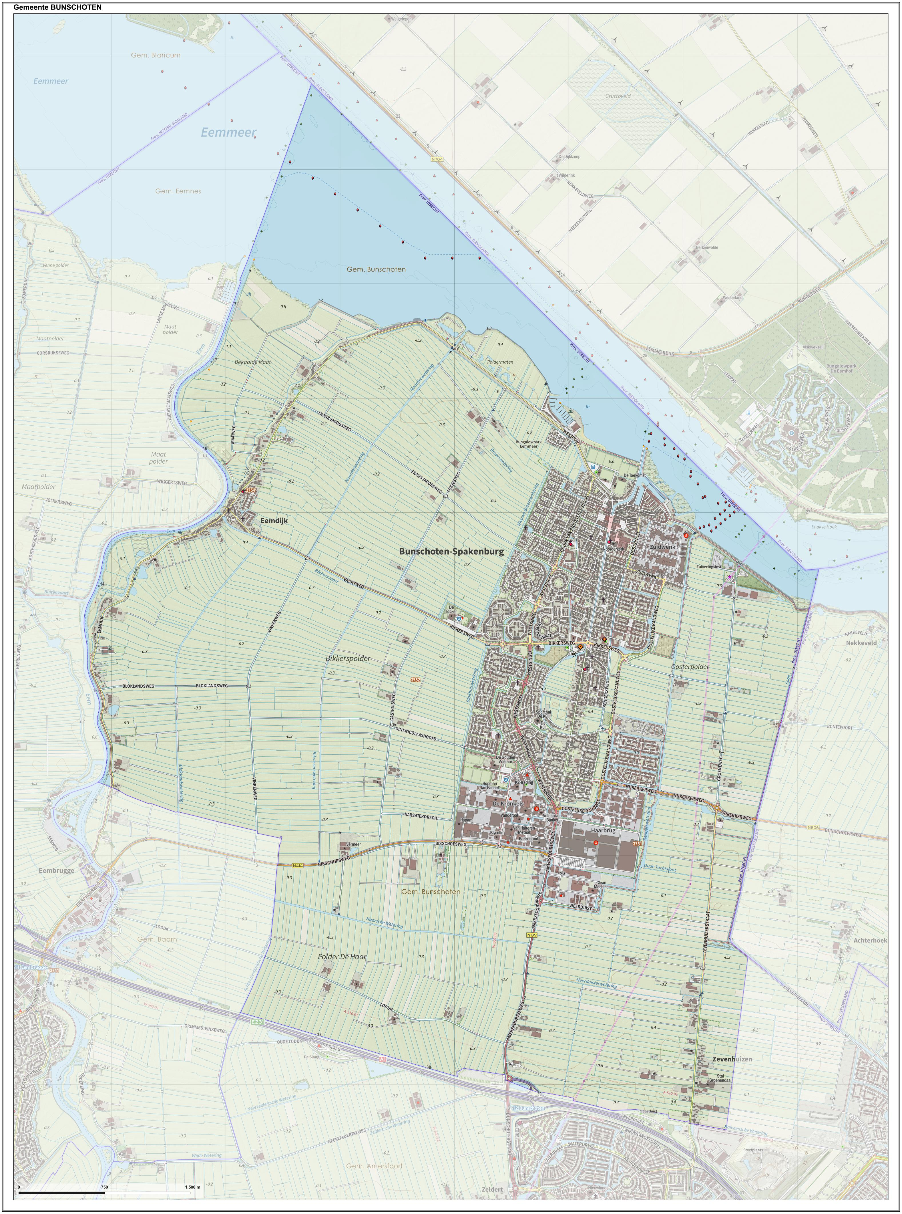 Topografische gemeentekaart. Resolutie: 400 pixels/km. Kaartbeeld samengesteld uit de open geodata van de Top10NL en Top25namen (Kadaster), Creative Commons-BY licentie. Gebouwvlakken uit open geodata BAG extract. Wegen uit de OpenStreetMap, OpenStreetMap community. Reliëfschaduw uit de Actuele Hoogtekaart AHN2. Samenstelling en kleurenschema: Jan-Willem van Aalst, met QGIS. Zie ook de Legenda.